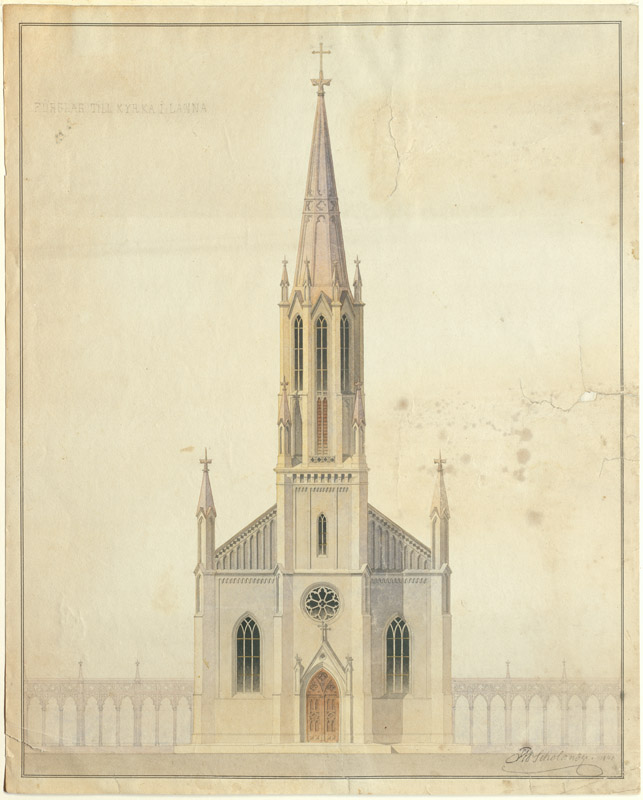 Förslag till ny kyrka 1841 - syftar troligen på Lannas nya kyrka, senare Lannaskede-Myresjö kyrka. Kyrkan från väster. Ritning av Fredrik Wilhelm Scholander. Motiv: Lannaskede kyrka Kategori: Ritning, (01) Exteriörer Förslag till ny kyrka 1841 - syftar troligen på Lannas nya kyrka, senare Lannaskede-Myresjö kyrka. Kyrkan från väster. Ritning av Fredrik Wilhelm Scholander.